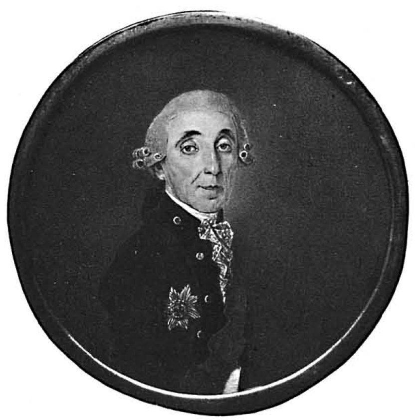 Михаил Матвеевич Херасков (1733-1807)